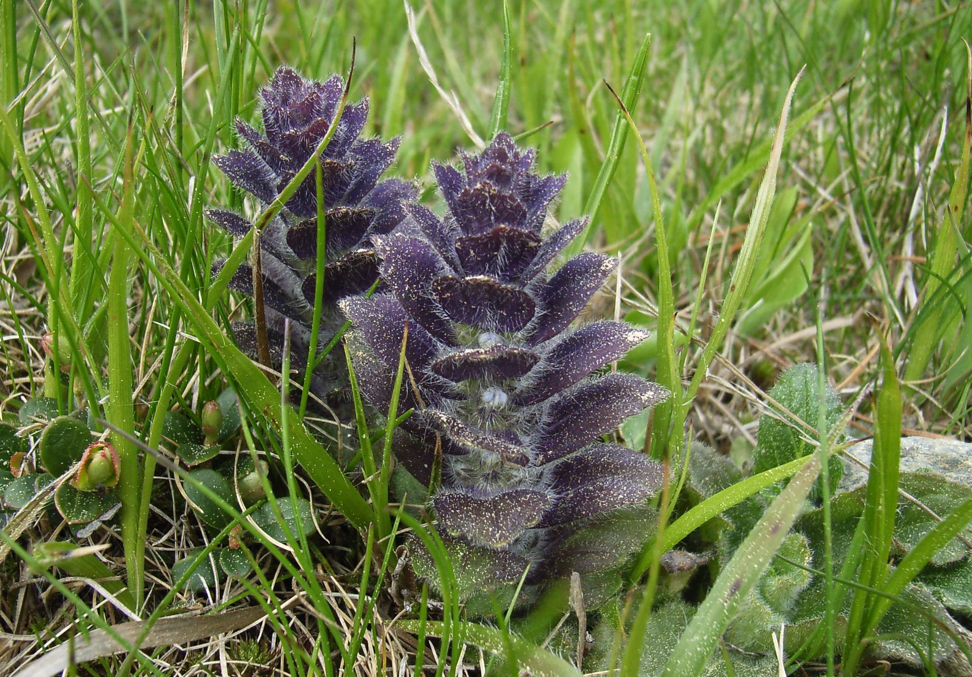 Ajuga pyramidalis South Tyrol, Vigiljoch ~1400 m NN